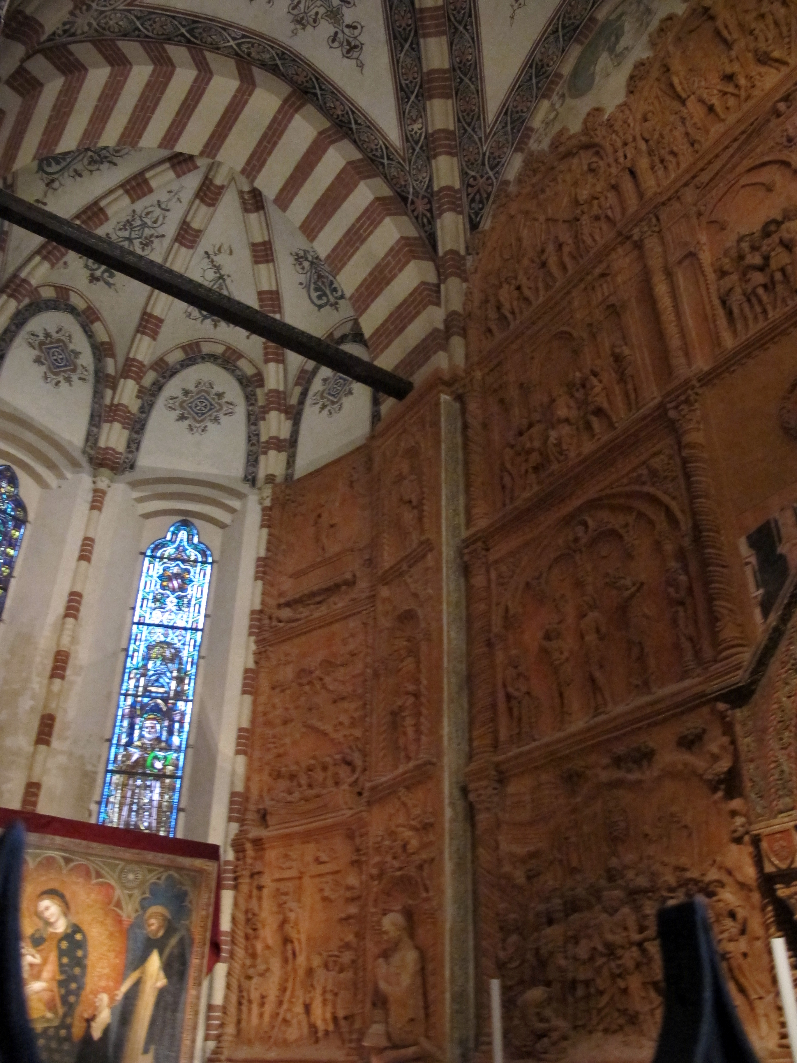 Santa Anastasia (Verona)